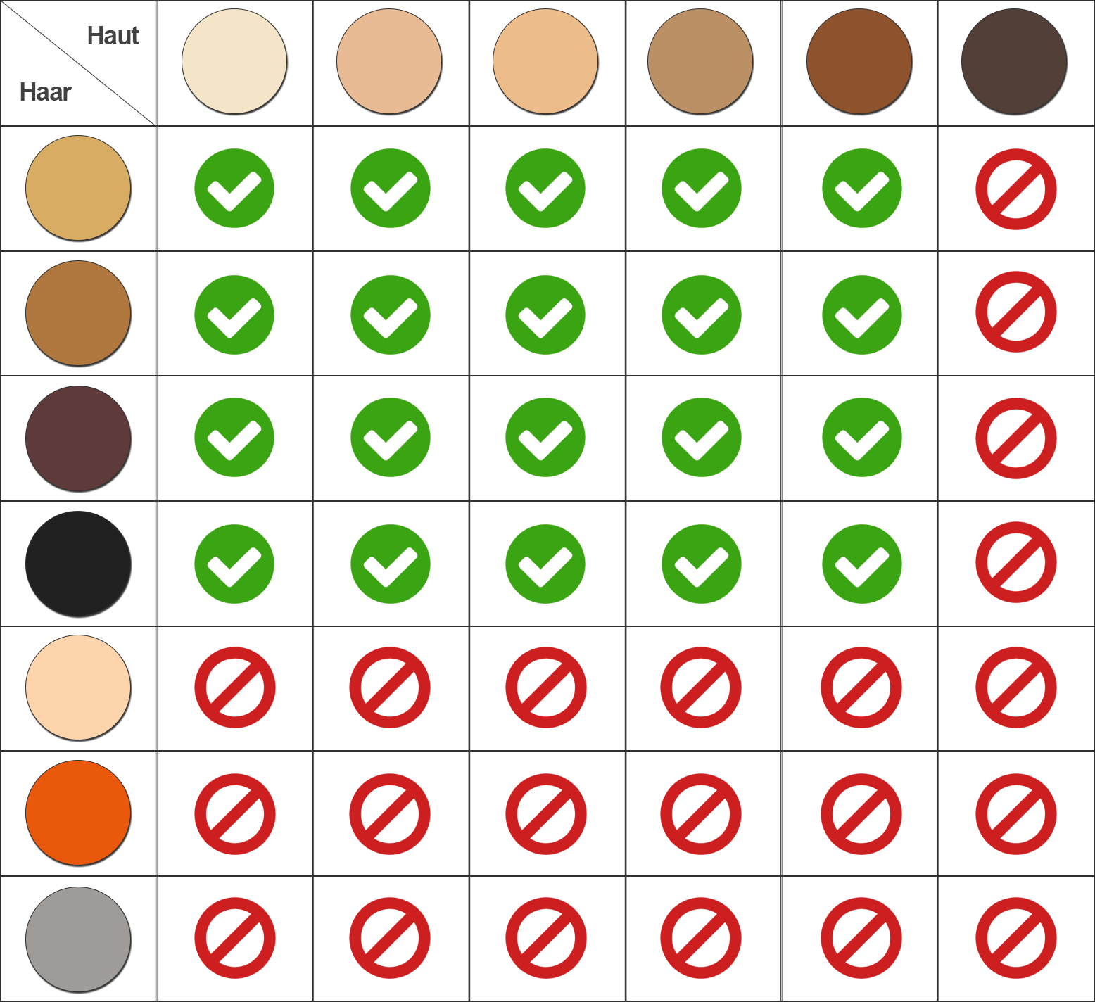 Das Bild klärt auf, welche Haarfarbe und welcher Hautton für die IPL-Technik geeignet ist.